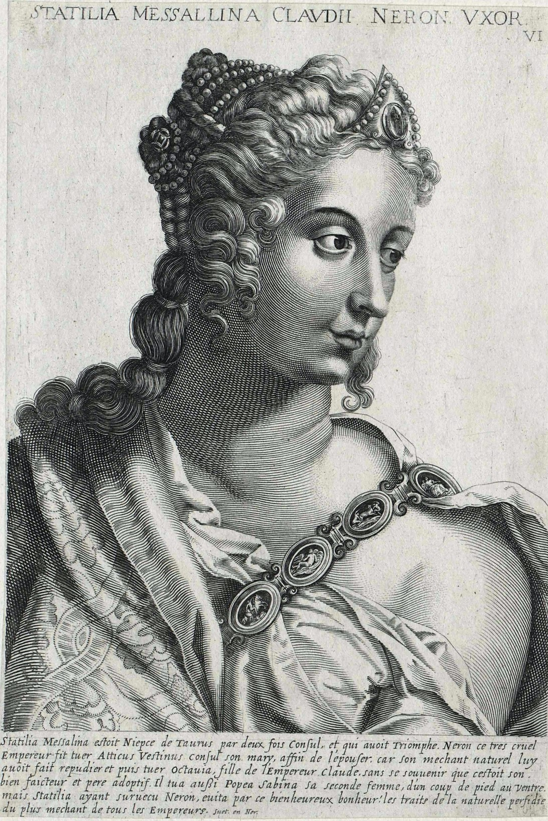 Statilia Messalina (30- 40 nach Chr. - nach 69 nach Chr.)